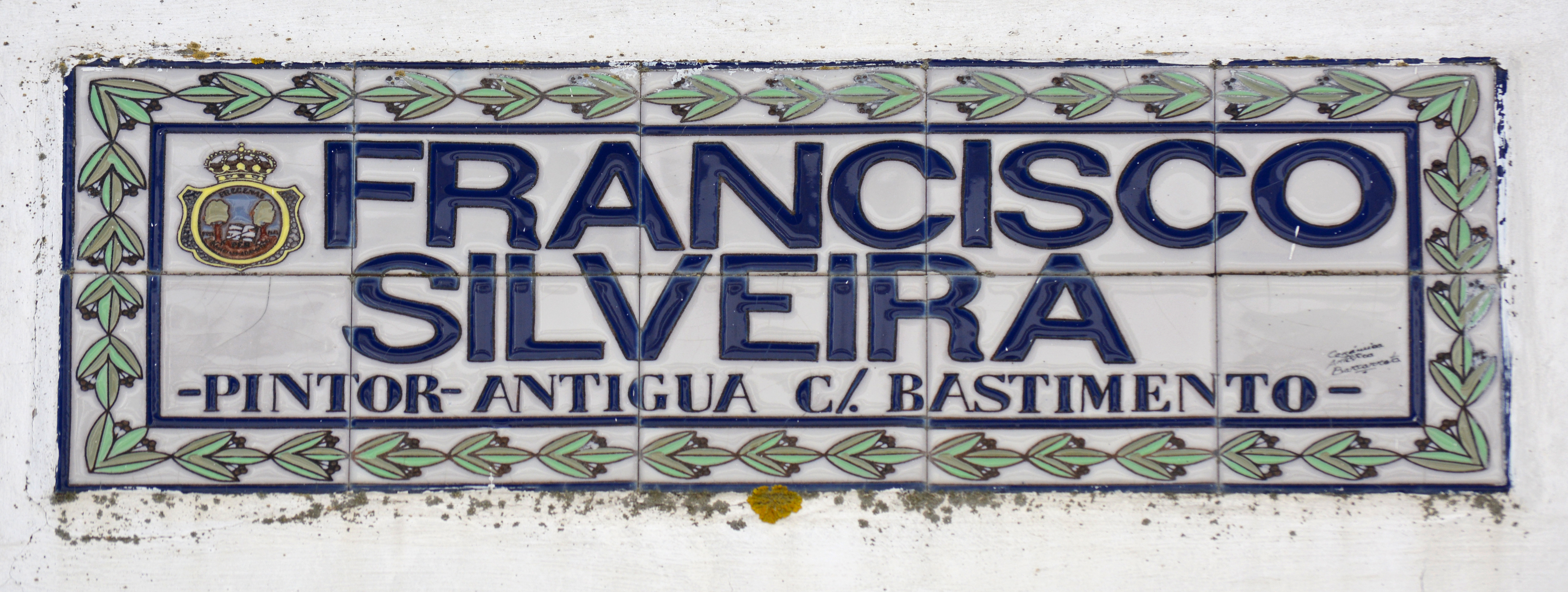 Fregenal de la Sierra (Badajoz). Placa identificativa de la calle FRANCISCO SILVEIRA.